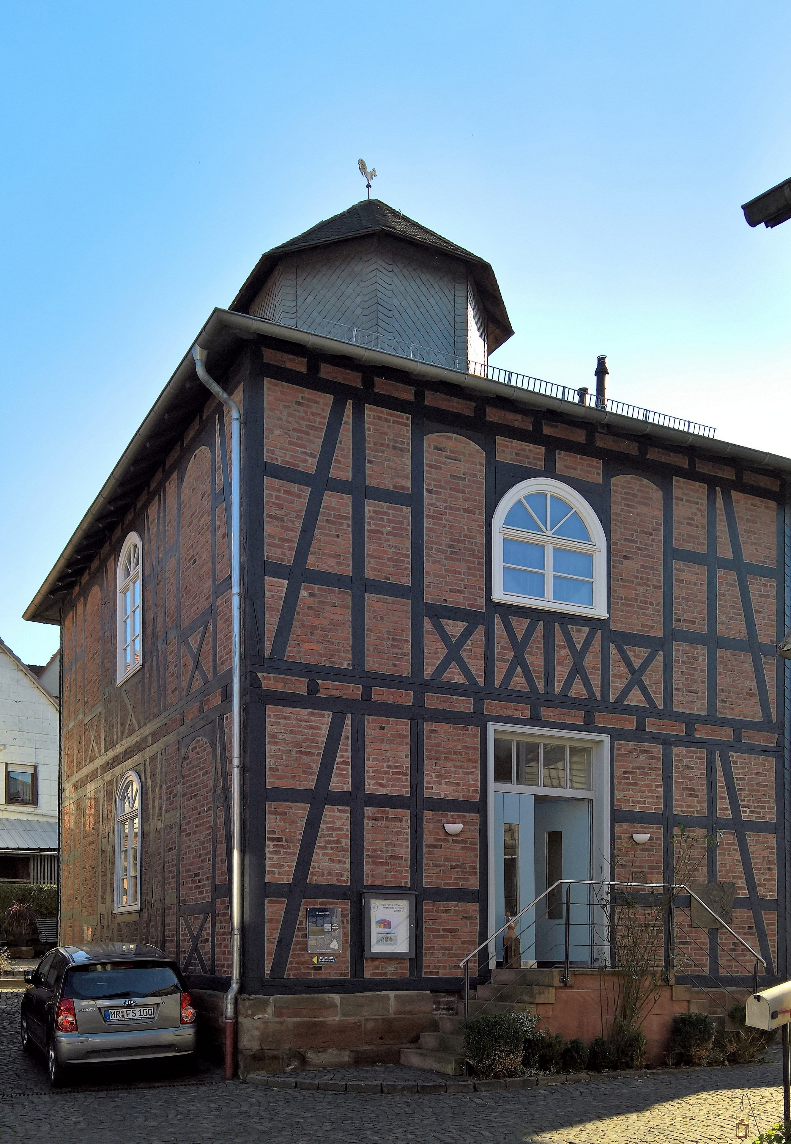 Auf diesem Bild habe ich die ehemalige Synagoge von Wetter (Hessen) fotografiert.